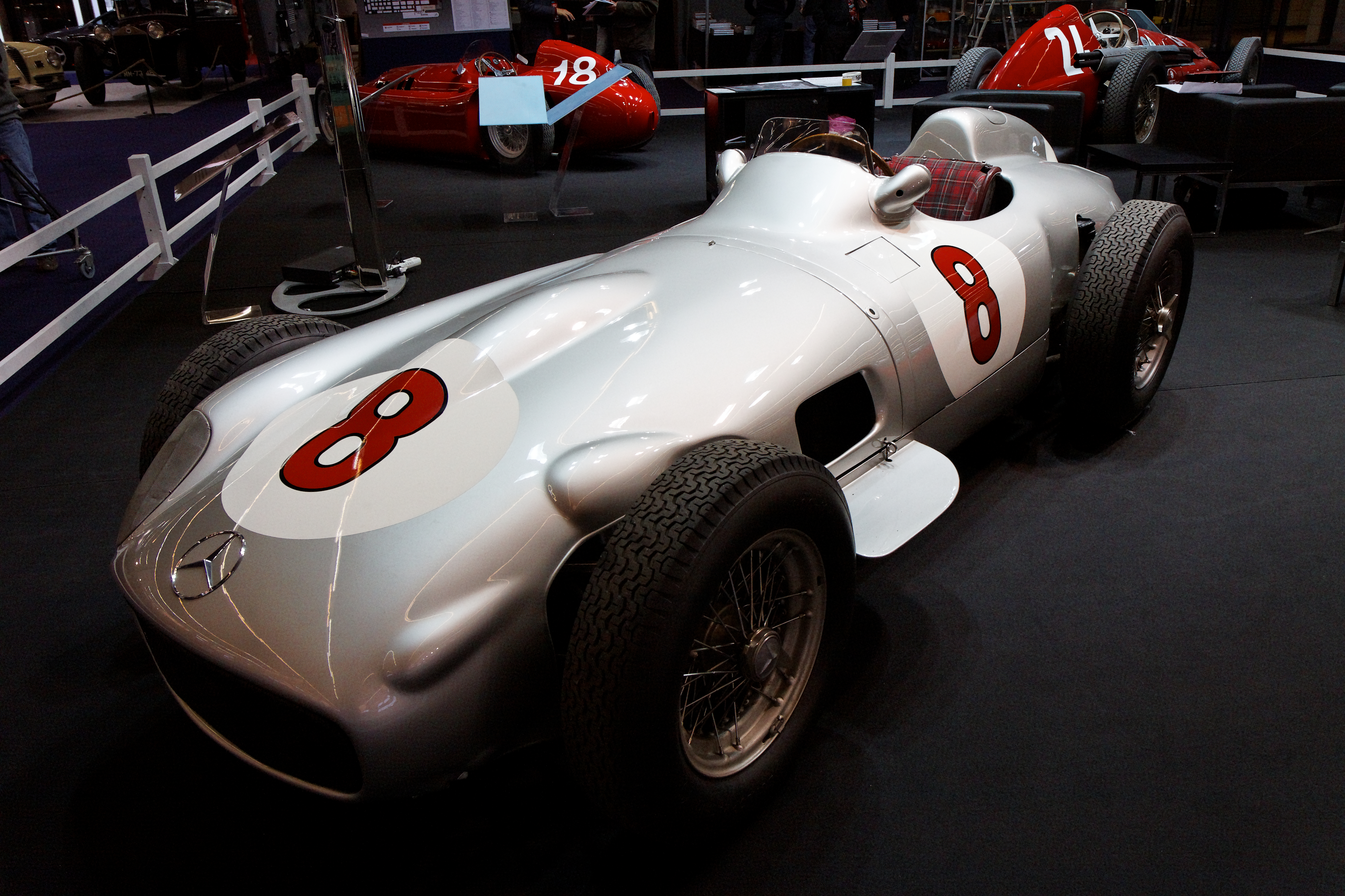 Photographie prise lors du salon rétromobile 2011 à Paris, porte de Versailles.